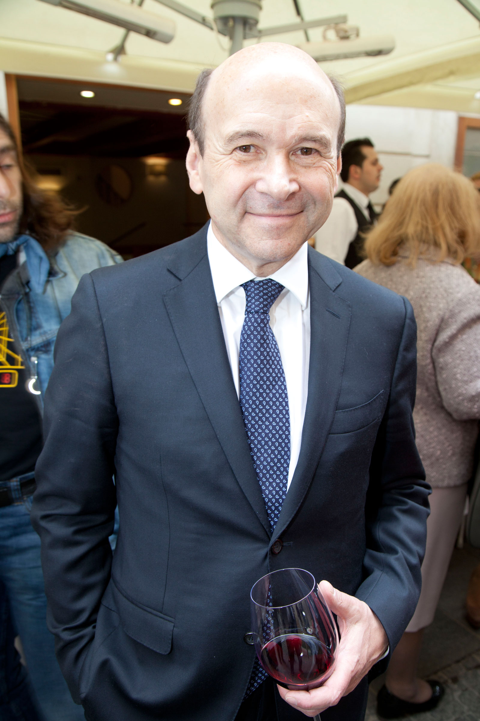 Meyer_Dominique-4276